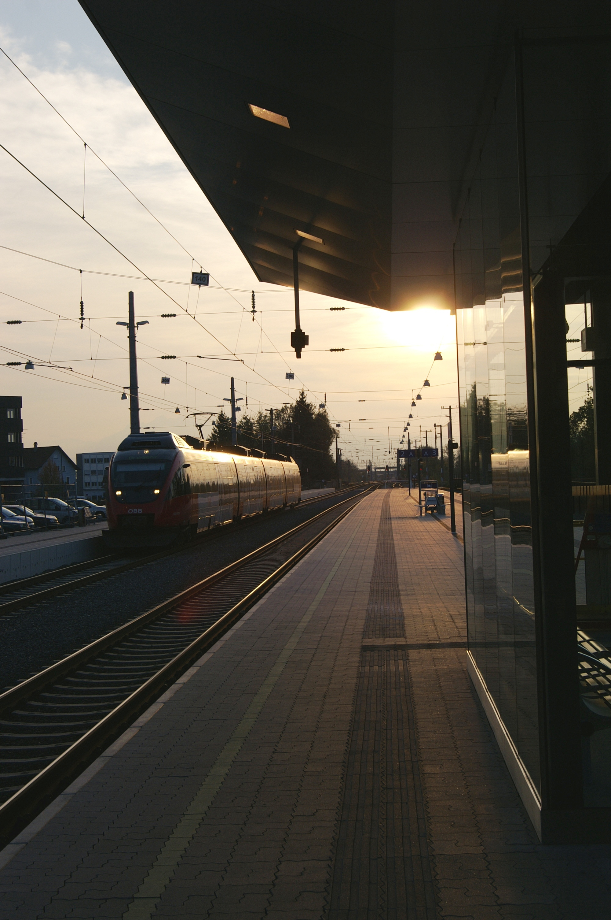 Dornbirn, in Vorarlberg. Einfahrt eines Nahverkehrszuges der Reihe 4024